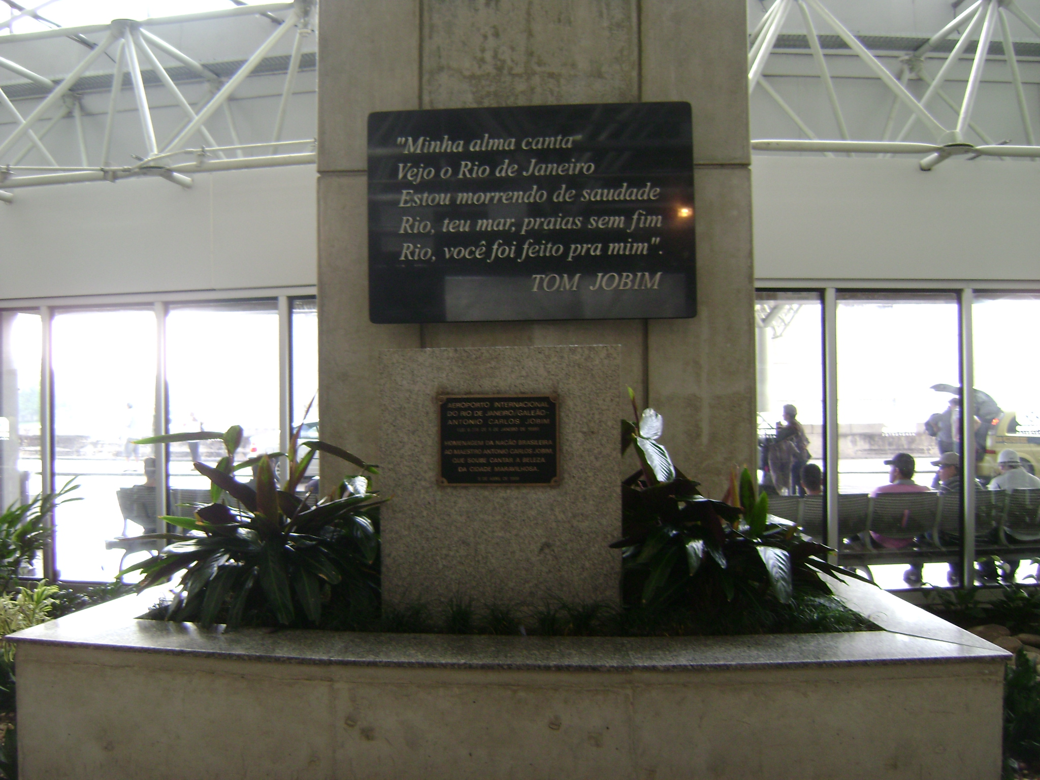 Inscrição em homenagem ao Tom Jobim, no Aeroporto Internacional do Rio de Janeiro Tom Jobim/Galeão, Brasil.